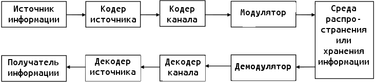 Блок-схема к статье.